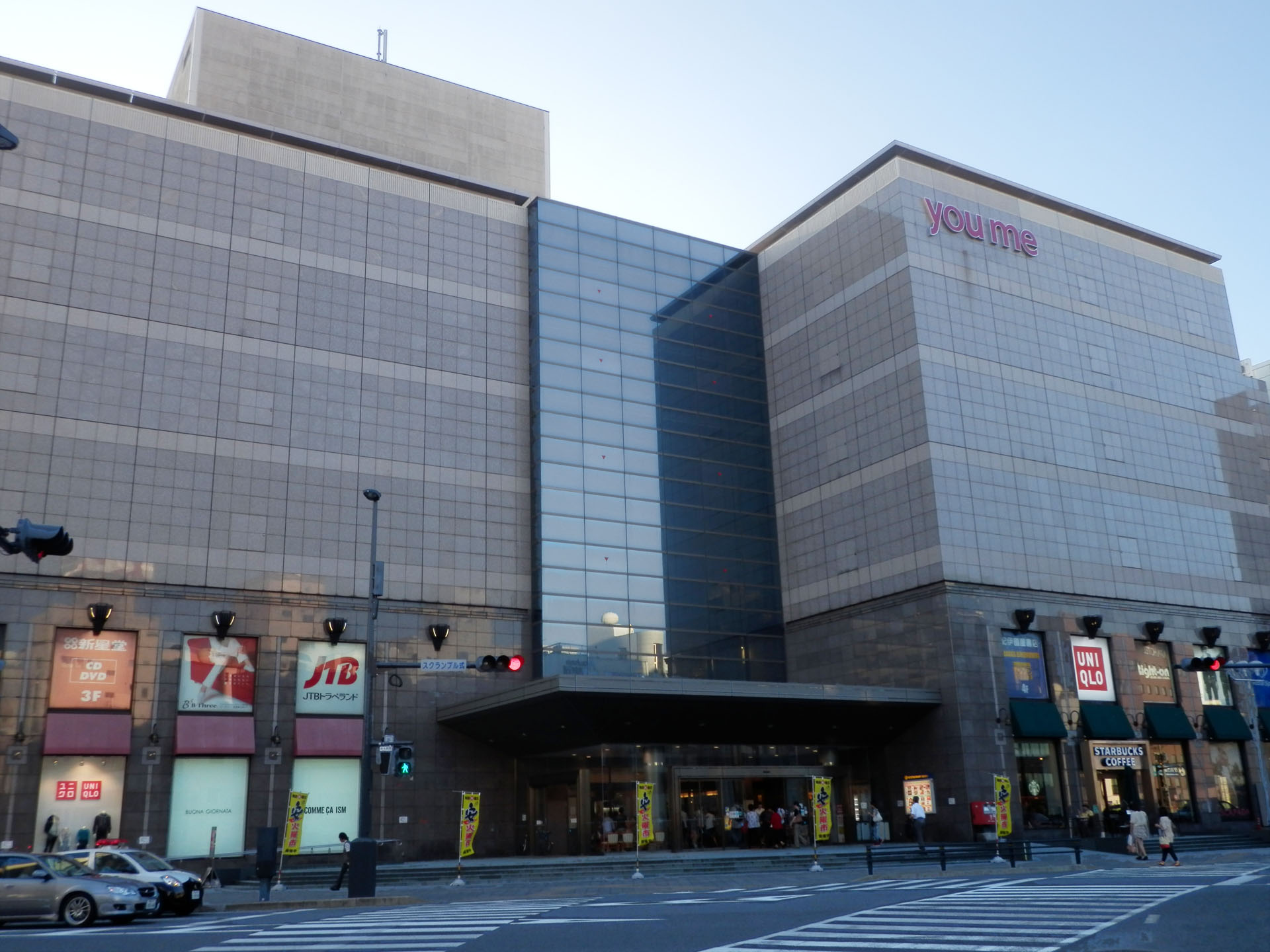 ゆめタウン夢彩都店（夢彩都より改称）